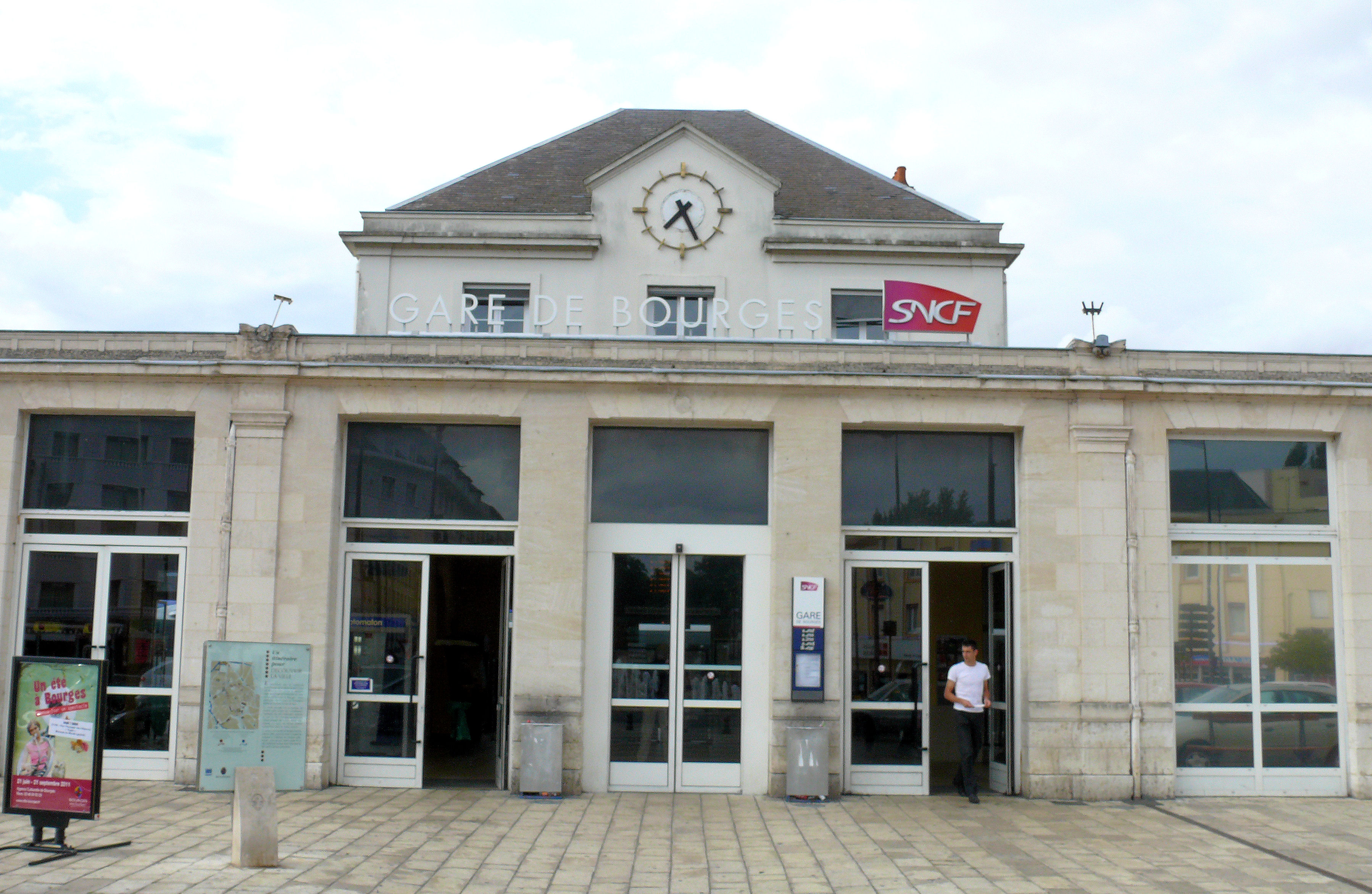 Bourges - Place du Général-Leclerc - Gare